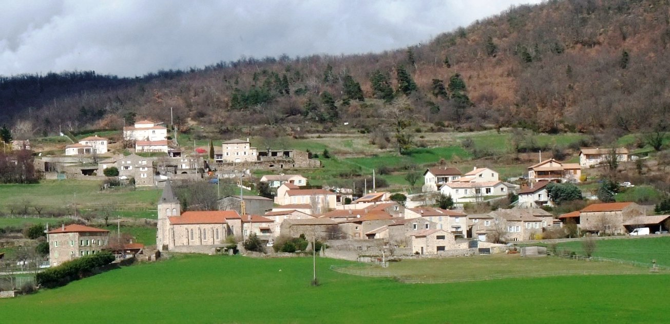 Savas village vue générale